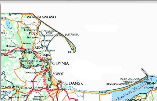 Fragment mapy przedstawiający Zatokę Gdańską